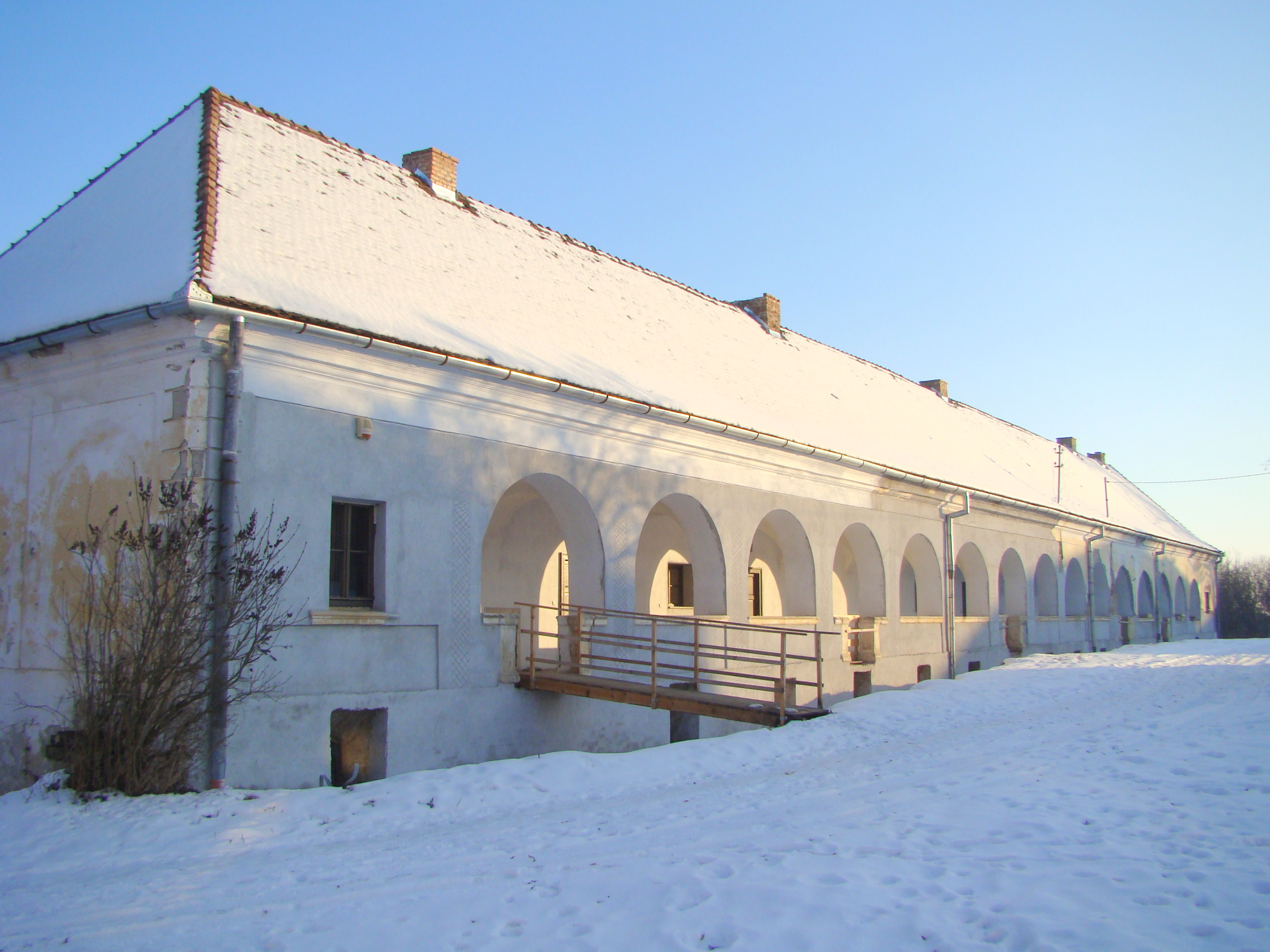 Ansamblul conacului Zichy, sat Voivodeni; comuna Voivodeni, judeţul Mureş